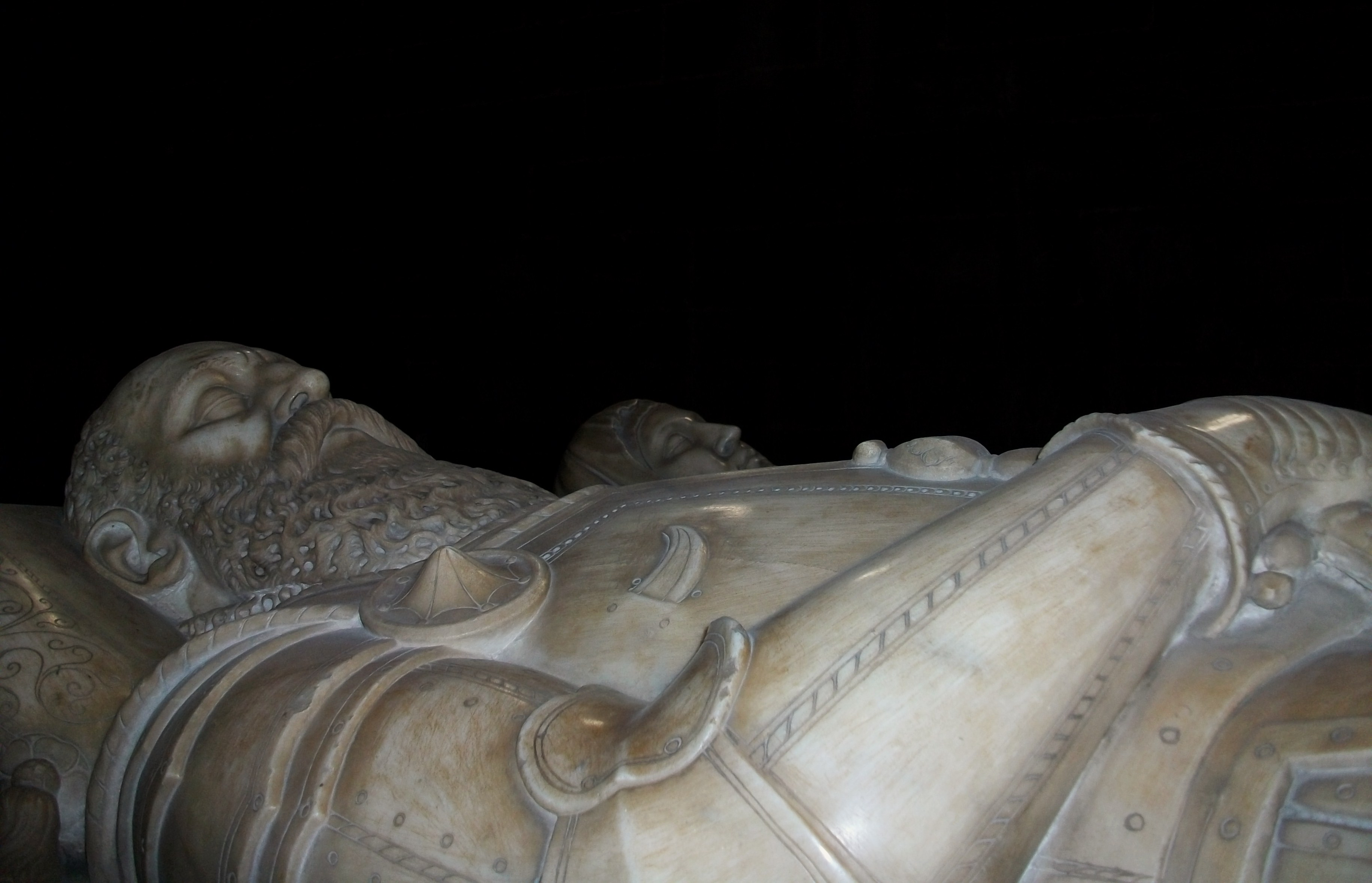 Les estàtues dels marquesos de Zenete (Rodrigo Díaz de Vivar y Mendoza (1466-1523) i Maria de Fonseca i Toledo) al seu sepulcre de la capella dels Reis del convent de sant doménec de Valèncua.